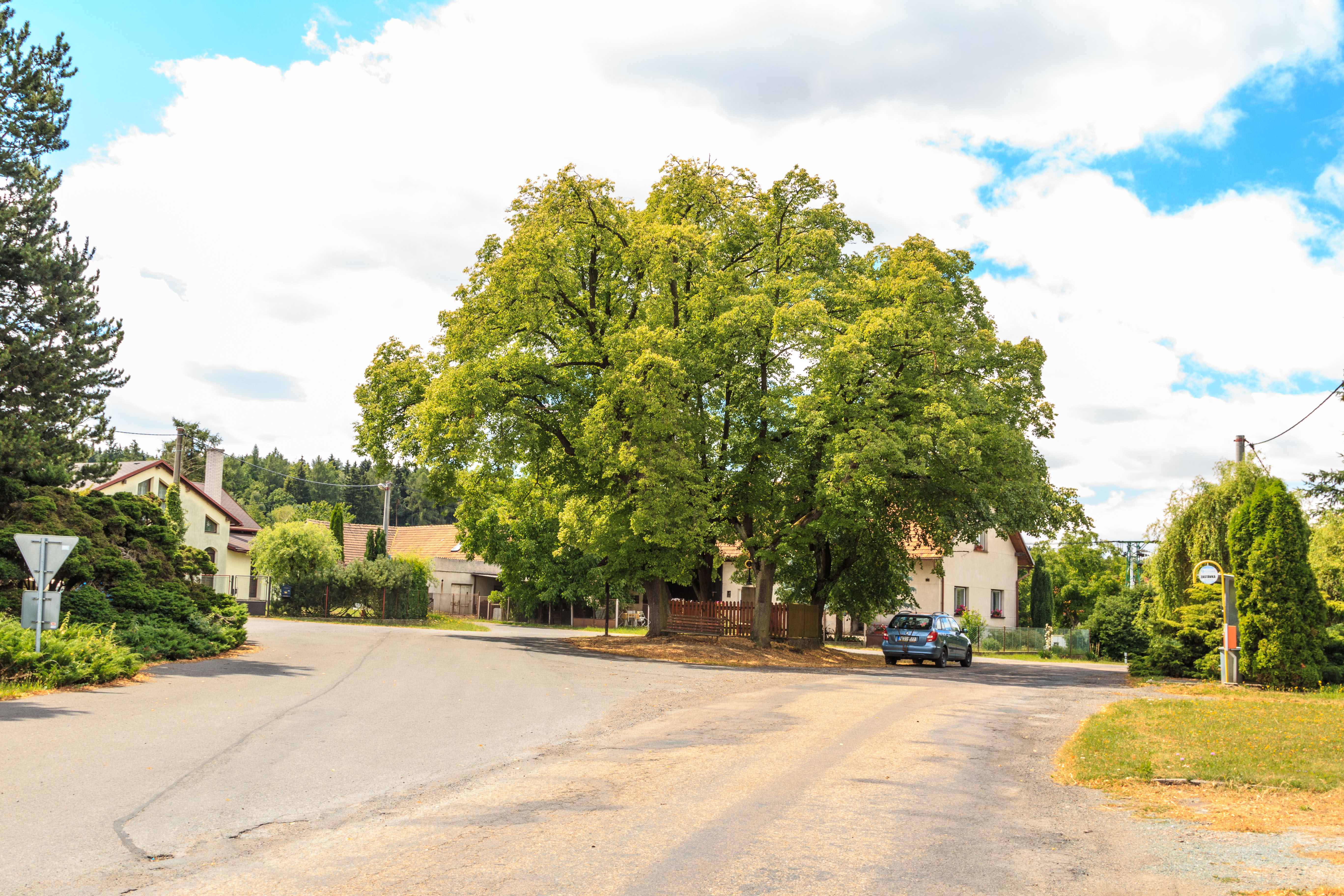 Slavkovice lípy